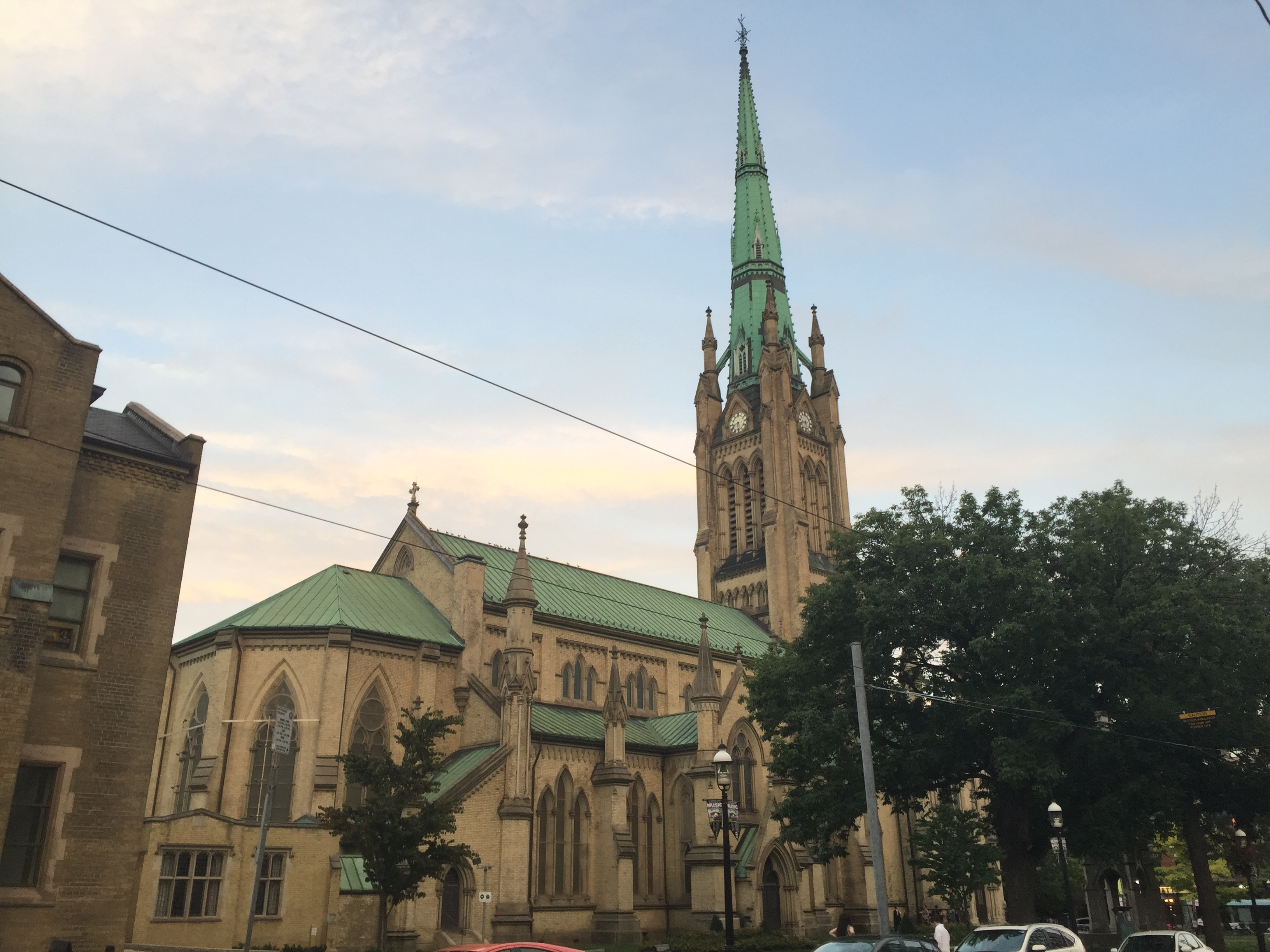 j